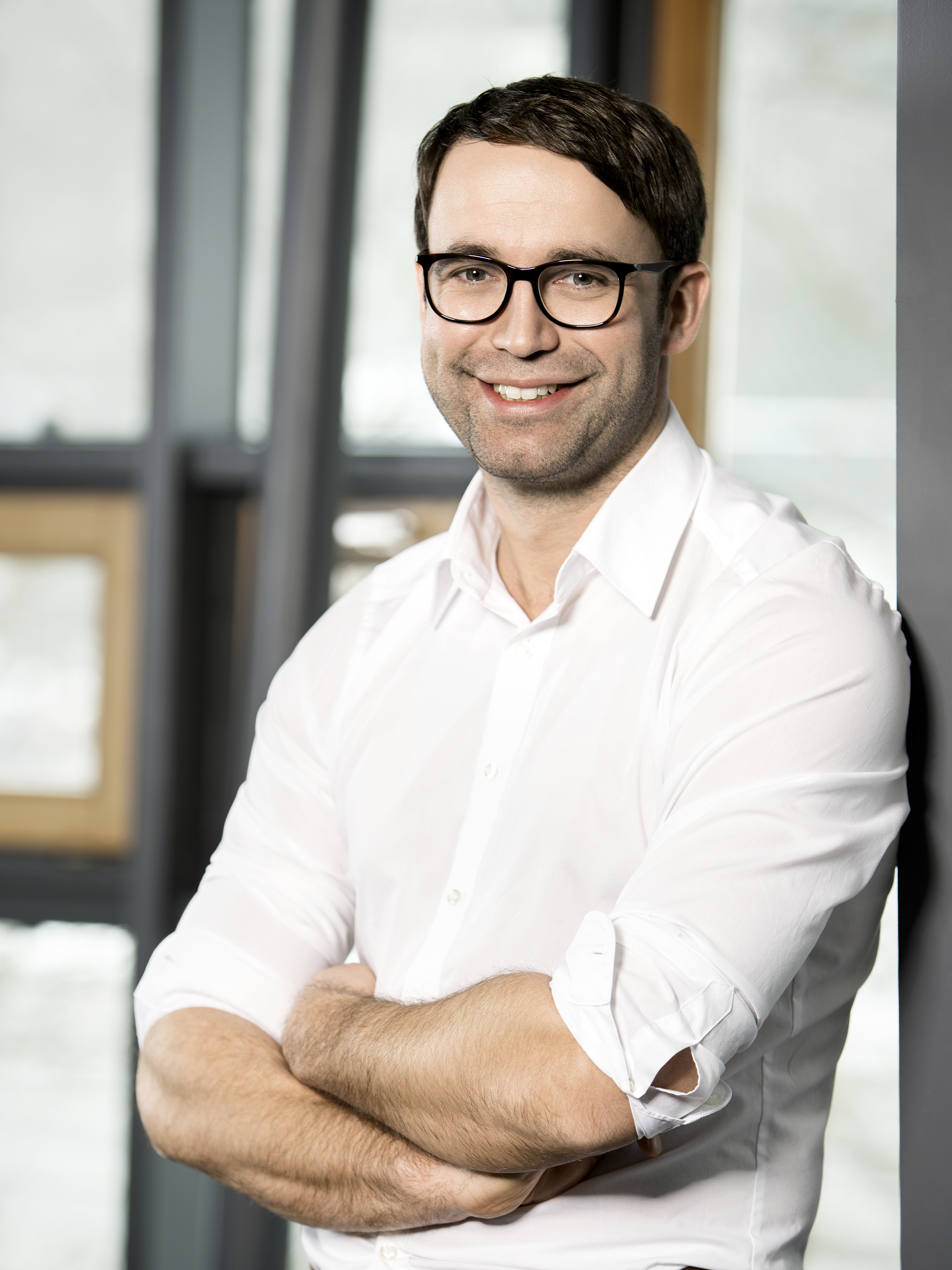 Berufsschullehrer Max Deisenhofer ist seit Herbst 2018 Mitglied des Bayerischen Landtags.